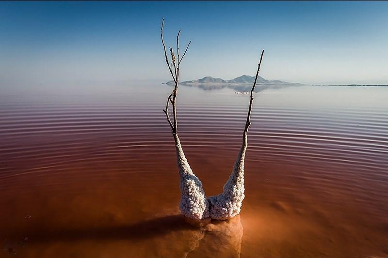 سرخی دریاچه ارومیه - تغییراتی مانند قرمز رنگ شدن دریاچه ارومیه در دریاچه های شور جهانی نظیر گریت سالت لیک آمریکا و دریاچه یوتا و بحرالمیت در اردن نیز دیده شده است.کارشناسان دلیل اصلی این تغییر رنگ را افزایش فعالیت آرتمیا و رشد جلبک در دریاچه ارومیه اعلام کرده اند. با کاهش دمای آب، شروع وزش بادهای منطقه ای و کاهش شدت و زمان نور خورشید و افزایش آب های ورودی ، این وضعیت به تدریج از بین خواهد رفت.